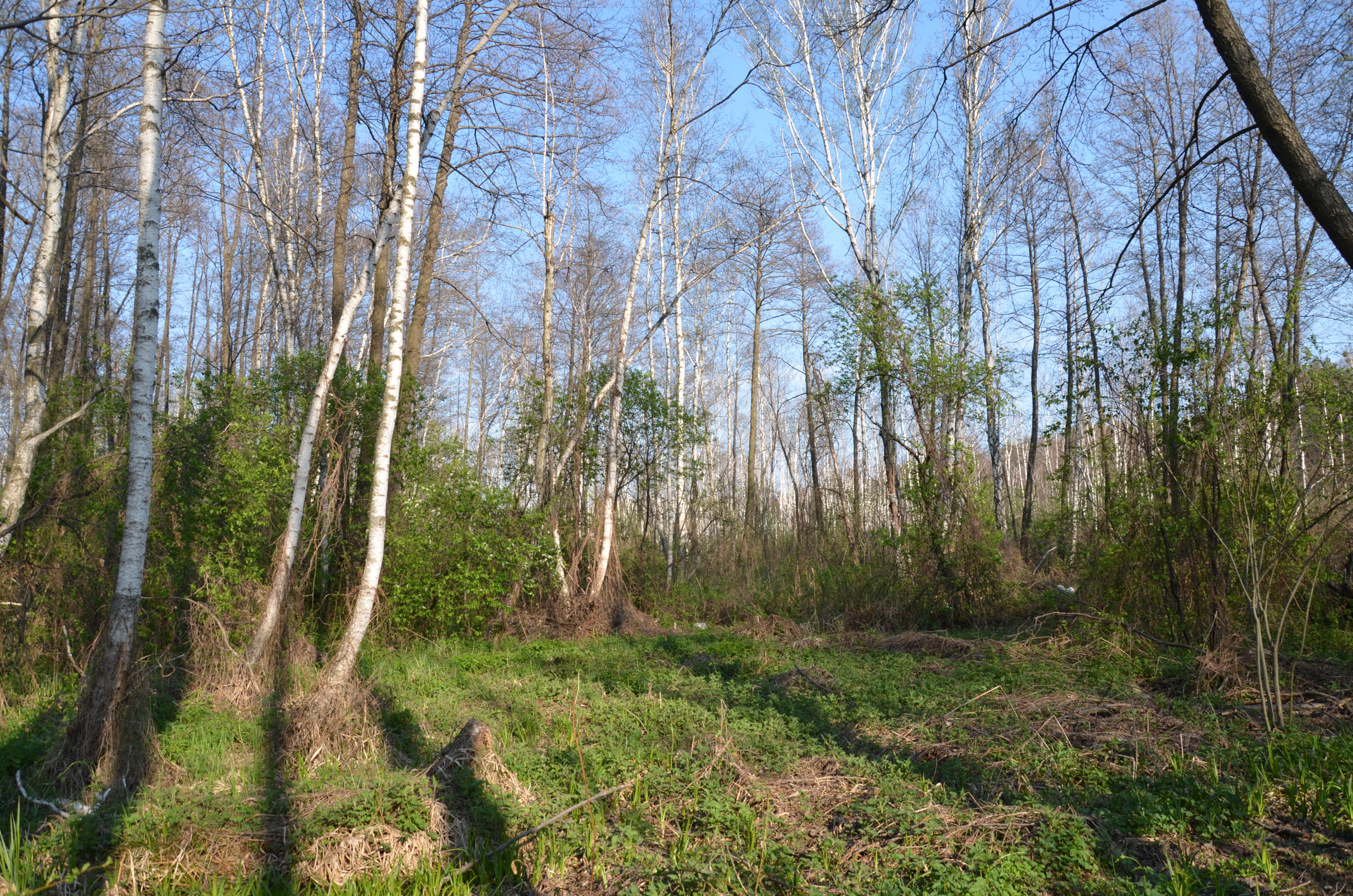 Романівське болото, Святошинський район